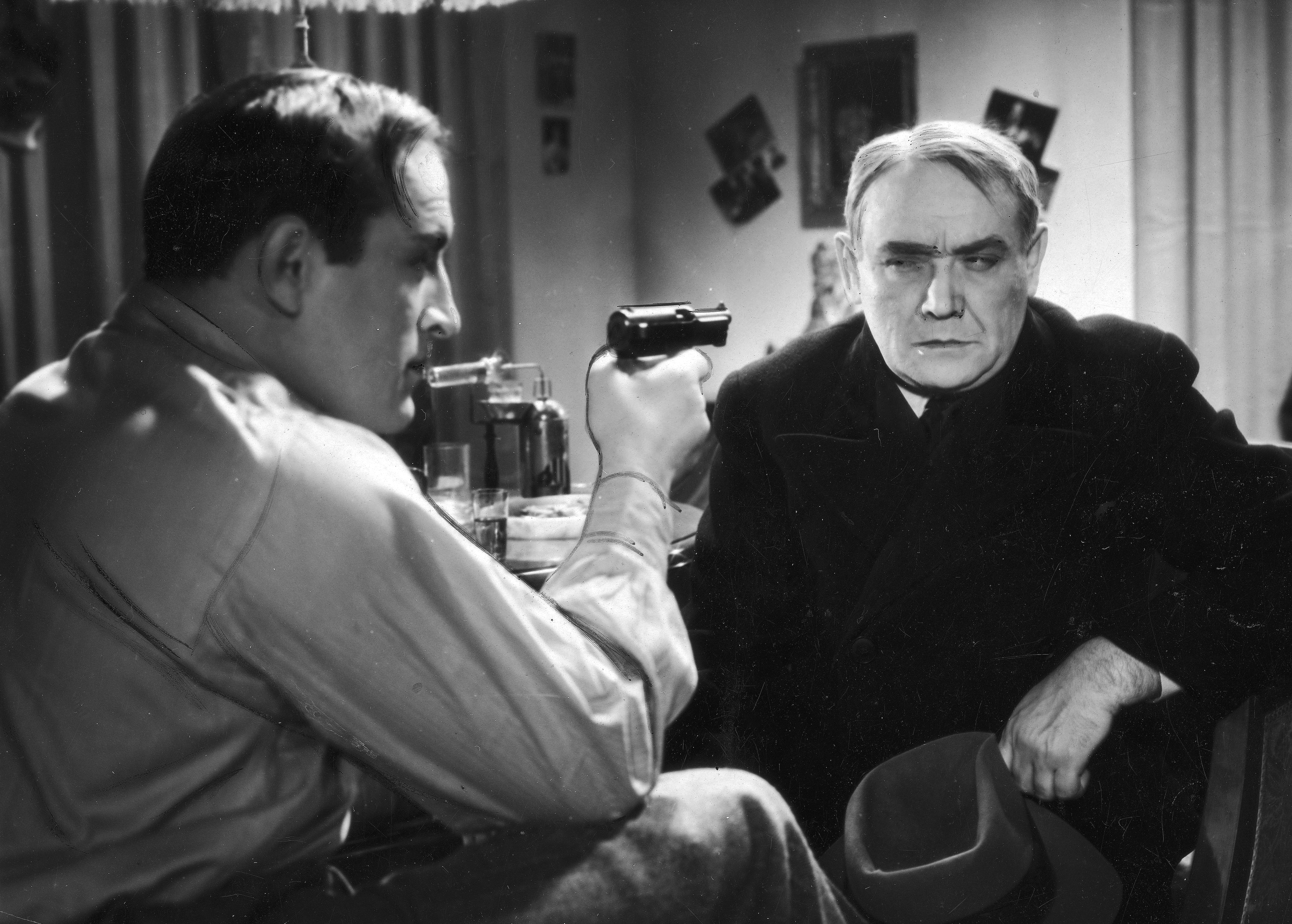 Tadeusz Olsza jako aktor Wiktor Grywicz i Stefan Jaracz jako sufler Konstanty Kurczek w jednej ze scen filmu Jego wielka miłość